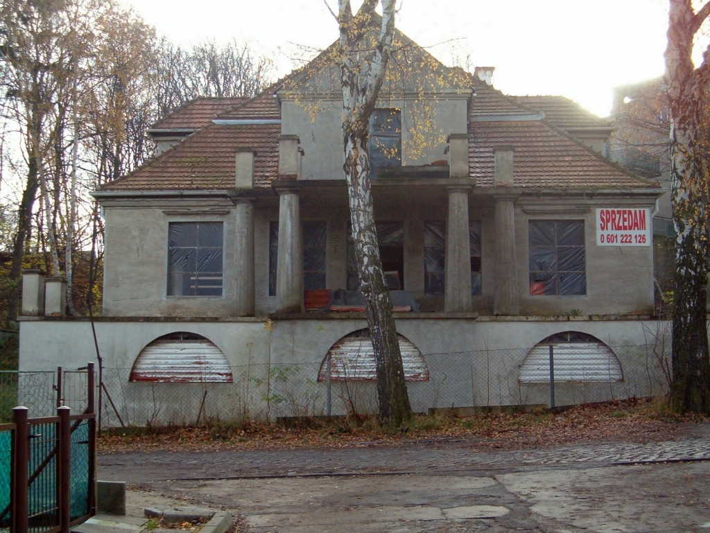 Gdynia, ul. Sędzickiego 24 - Willa "Otok", 1923